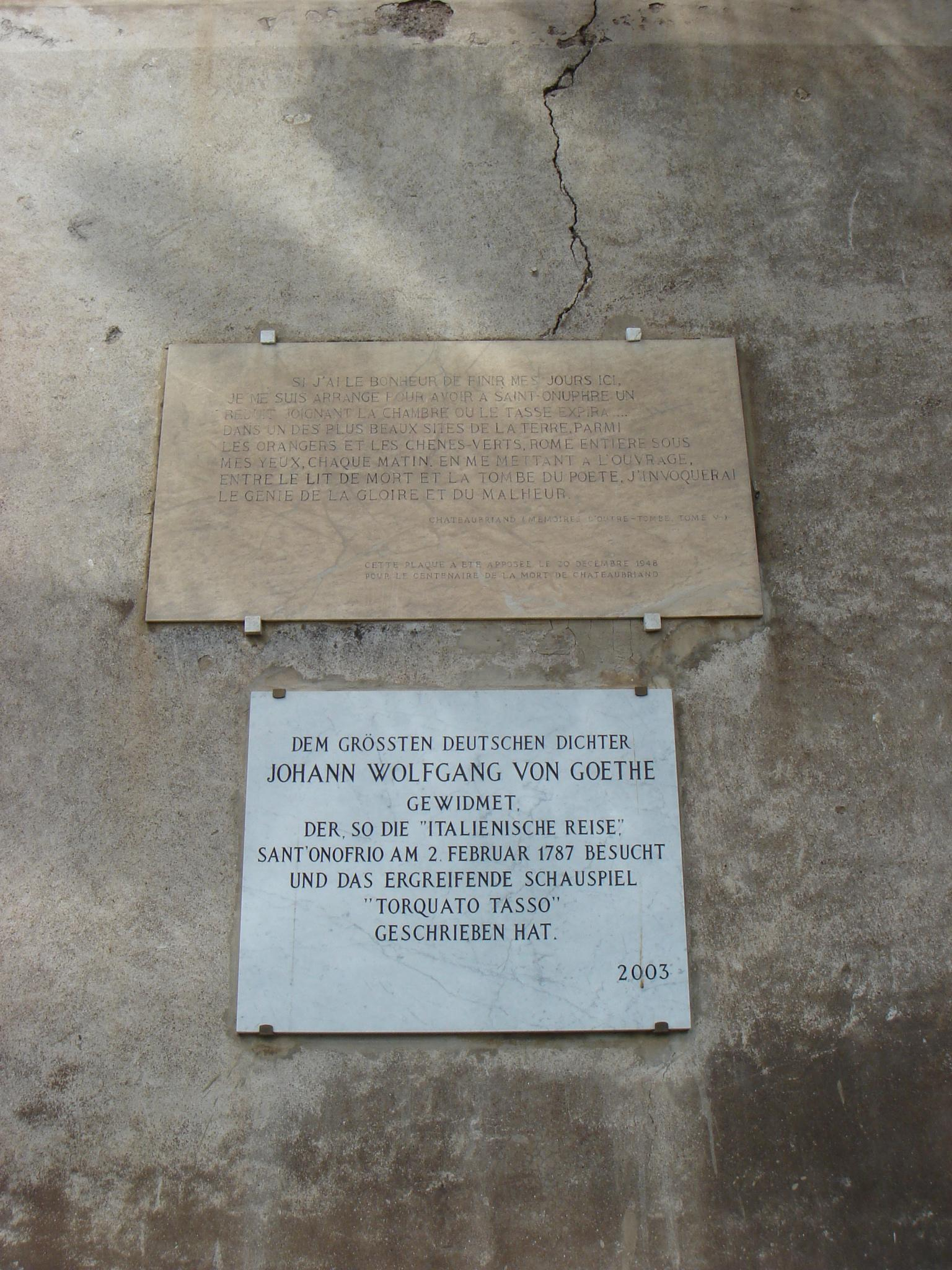 Rome, Saint-Onuphre-du-Janicule : « Si j'ai le bonheur de finir mes jours ici, je me suis arrangé pour avoir à Saint-Onuphre un réduit joignant la chambre où Le Tasse expira... Dans un des plus beaux sites de la Terre, parmi les orangers et les chênes-verts, Rome entière sous mes yeux, chaque matin, en me mettant à l'ouvrage, entre le lit de mort et la tombe du poète, j'invoquerai le génie de la gloire et du malheur. Chateaubriand (Mémoires d'outre-tombe, tome V) Cette plaque a été apposée le 20 décembre 1948 pour le centenaire de la mort de Chateaubriand »